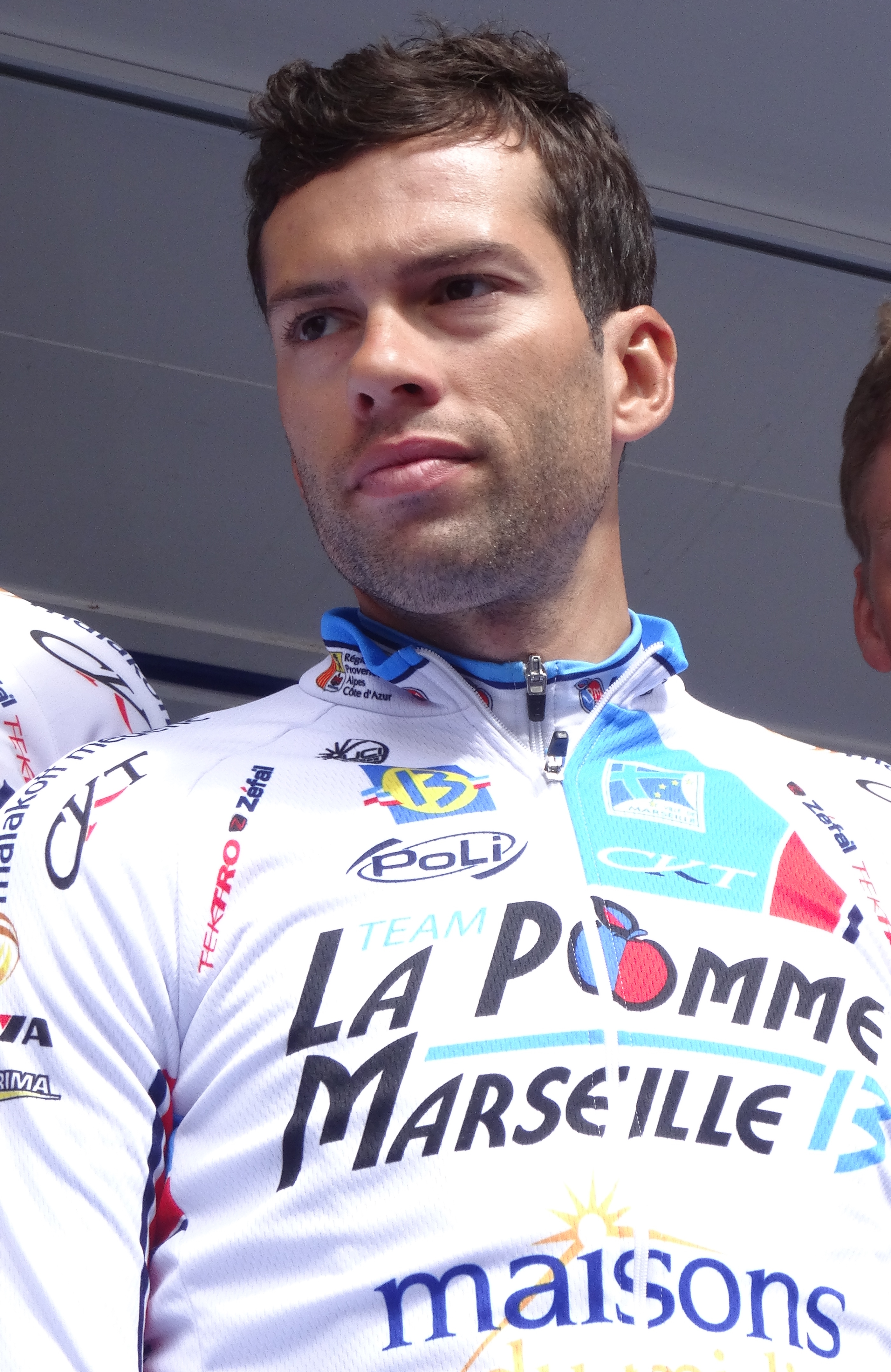 Reportage photographique réalisé le mercredi 7 mai 2014 au départ de la première étape de l'édition 2014 des Quatre jours de Dunkerque à Dunkerque, Nord, Nord-Pas-de-Calais, France. Depicted person: Julien El Fares Depicted team: La Pomme Marseille 13